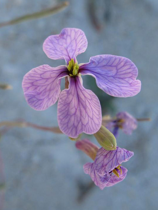 Flor de Moricandia arvensis en Alicante, España.